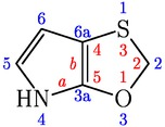 4H-[1,3]oxatiolo[5,4-b]pirrol szerkezeti képlete